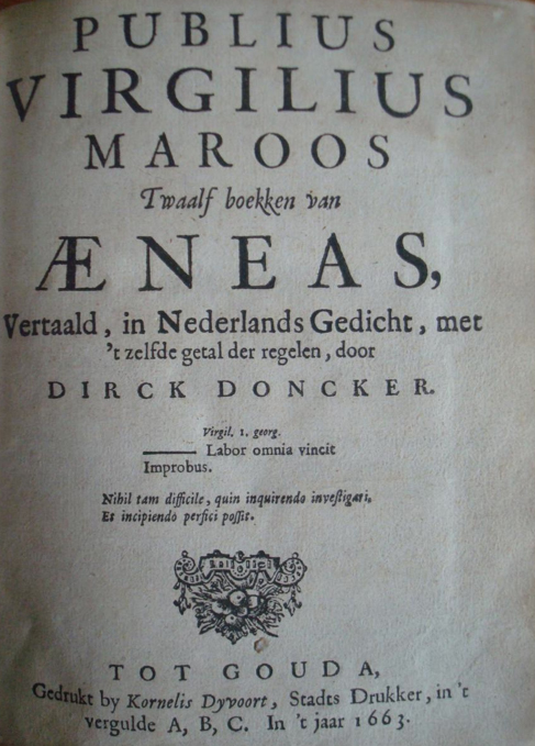 Titelblad van "Pub­lius Vir­gilius Maroos. Twaalf boekken van Aeneas"